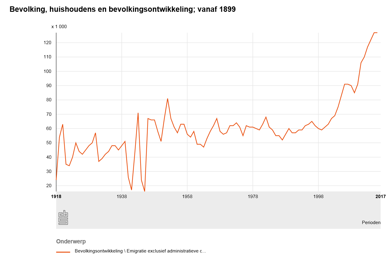 Bevolking vanaf 1899; emigratie